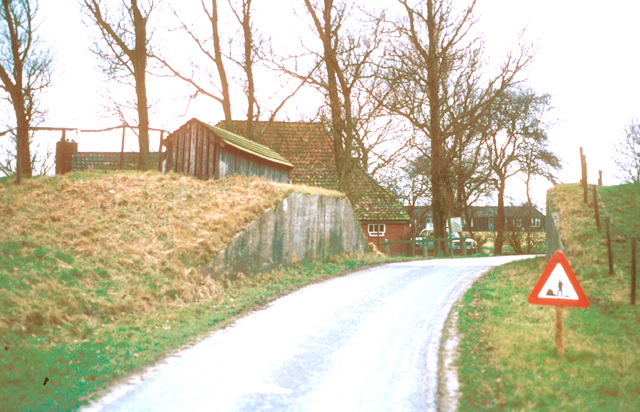 Coupure in de Noordpolderweg bij Westernieland. Deze coupure is inmiddels vervallen door de dijk op de plaats van de weg te verhogen.